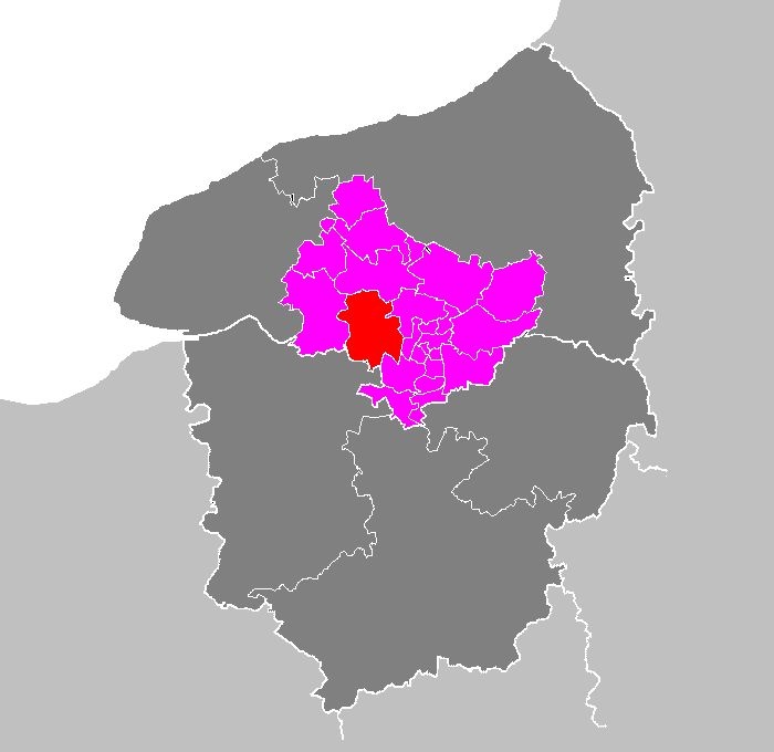 Maps of arrondissements and cantons of France: Arrondissement de Rouen - Canton de Duclair.PNG